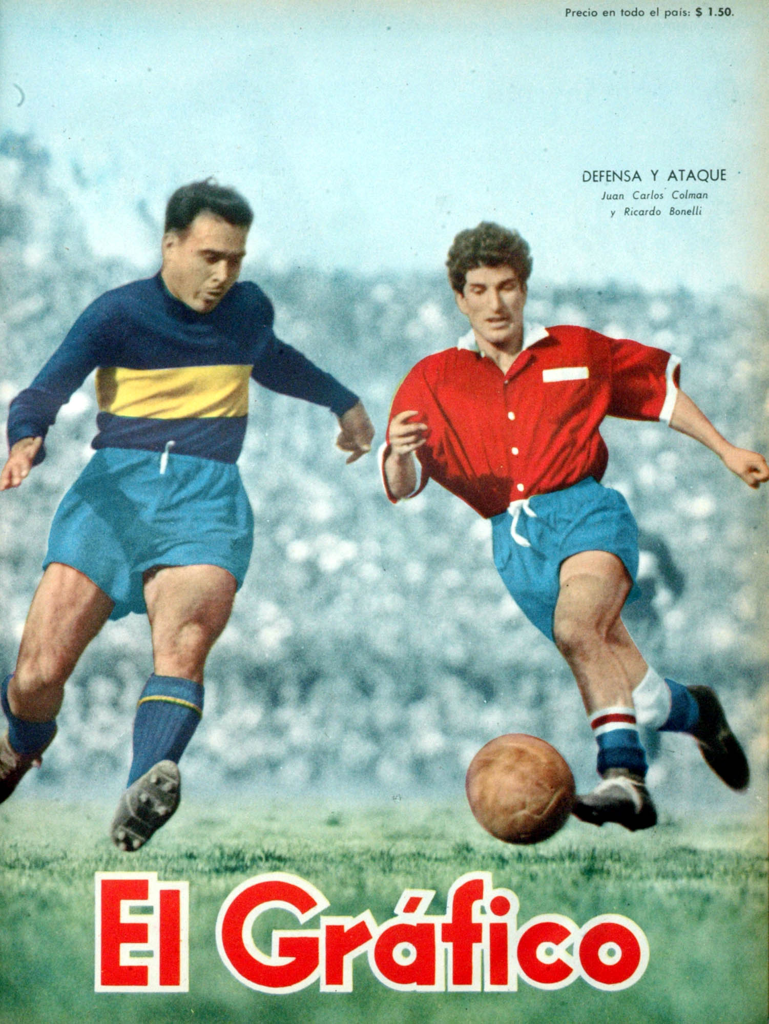 El Grafico del 03 de Septiembre de 1954. Edicion 1830